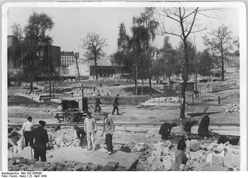 Aufbau der ersten Wohnzelle Berlins beginnt. Die ersten Bauarbeiten an der ersten Wohnzelle Berlins in der Karl-Marx-Allee haben begonnen. Nachdem seit der Grundsteinlegung am 21.12.1949 ein Teil des Gebäudes enttrümmert wurde, begannen jetzt die ersten Ausschachtungsarbeiten. UBz: Die Königsberger Straße wird aufgerissen, um für die Wohnzelle Platz zu schaffen. Im Hintergrund gestapeltes Baumaterial auf der Weberwiese. Aufn.: Illus Funck 6238-50 3 22.4.1950 Leihweise Illus Berlin W8